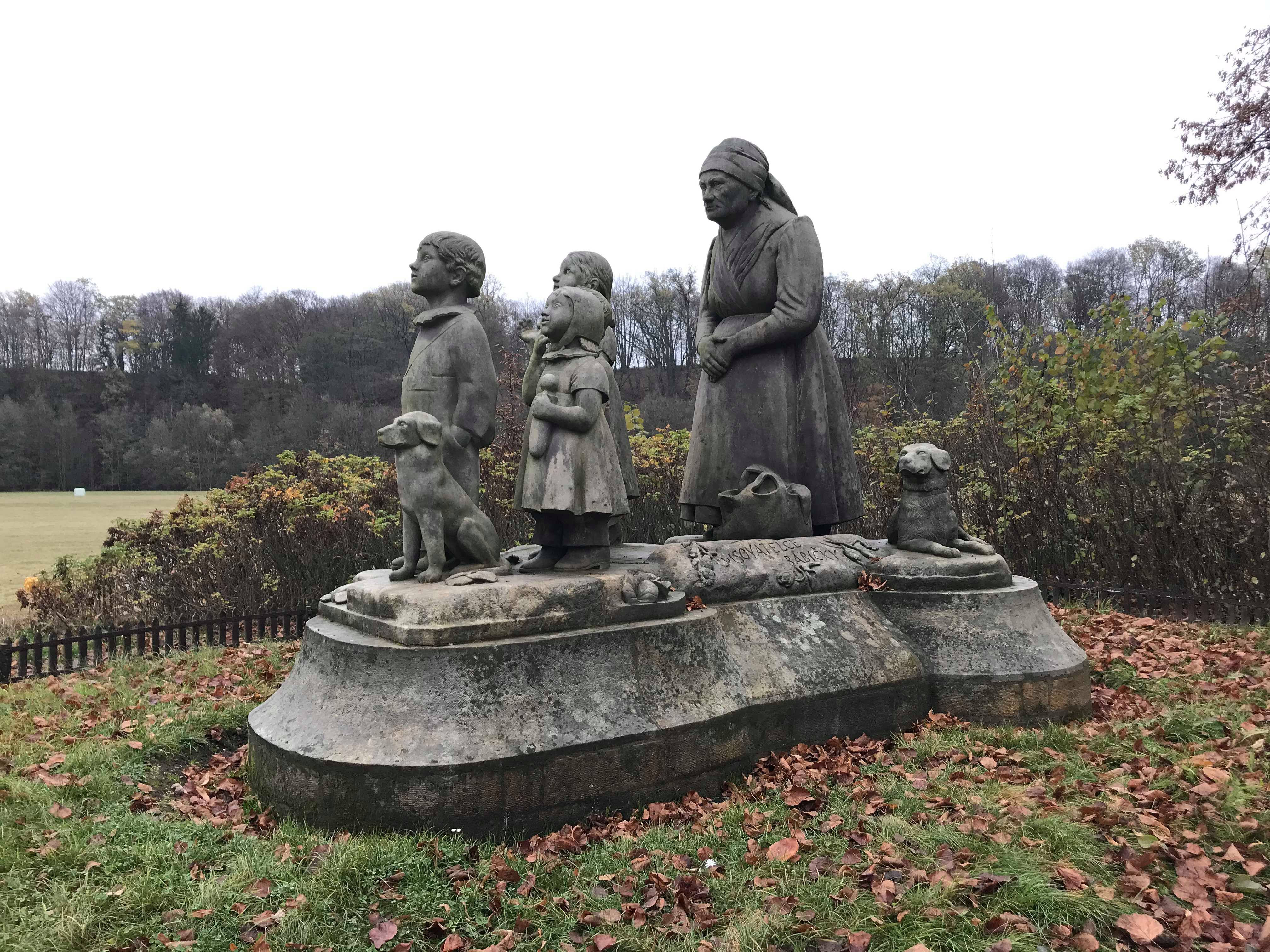 pomník Babičky v NPP Babiččino údolí